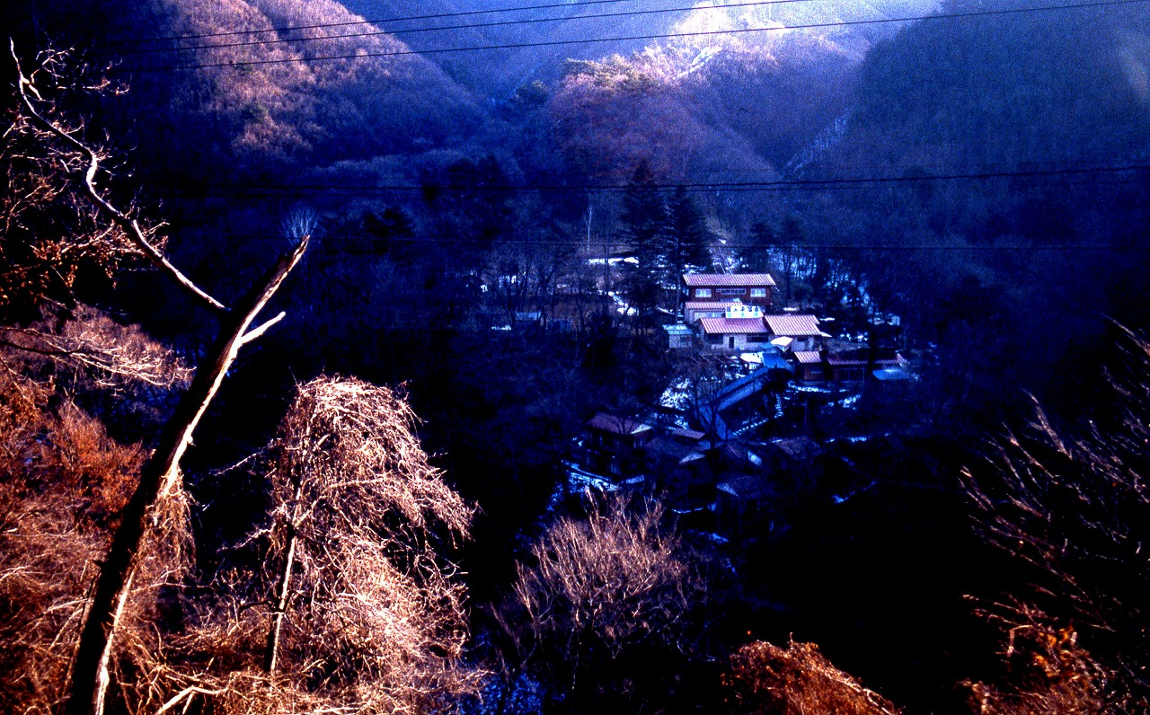 湯の平温泉（ゆのたいらおんせん）